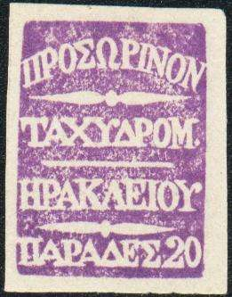 Первая почтовая марка британской почты на острове Крит